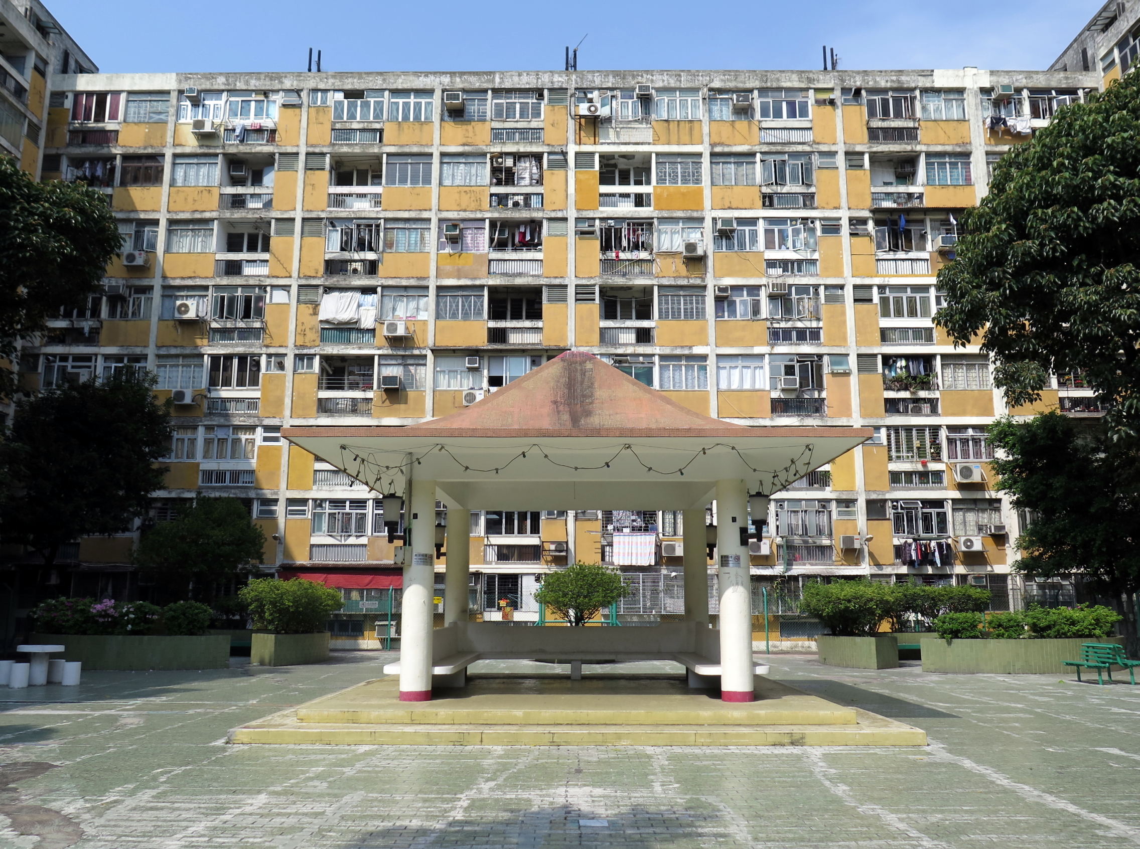 Tai Hang Sai Estate Open space